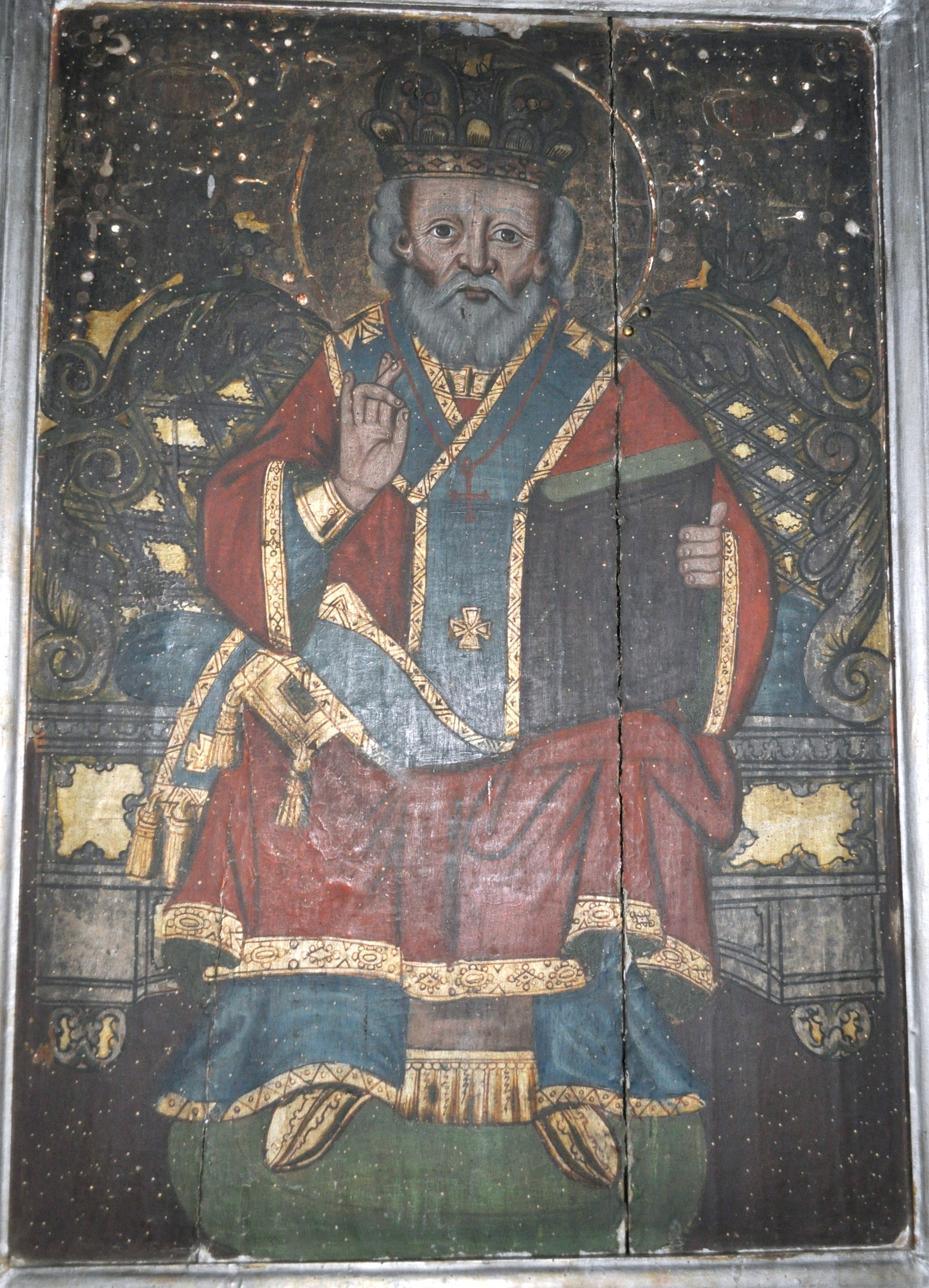 Biserica de lemn din Roșia Nouă, județul Arad